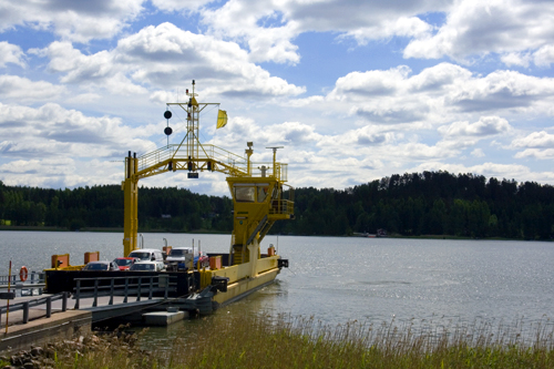 Lossi Kokkilasta Kemiönsaareen. Otettu Ankkuribaarin terassilta.